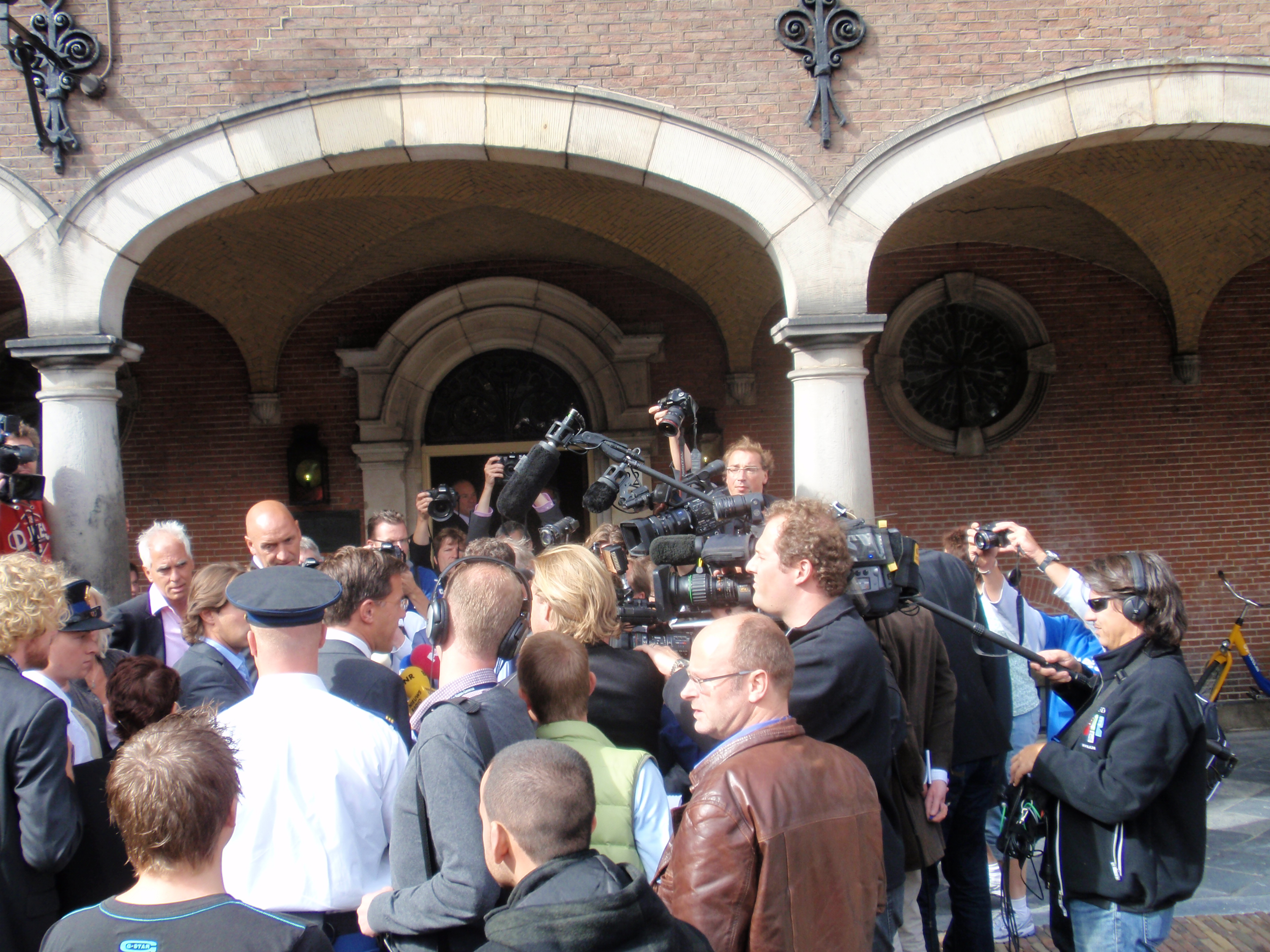 Mark Rutte wordt bestormd tijdens de kabinetsformatie 2010 kort na het her-aanstellen van Ivo Opstelten als informateur. Ingang van Eerste Kamer.